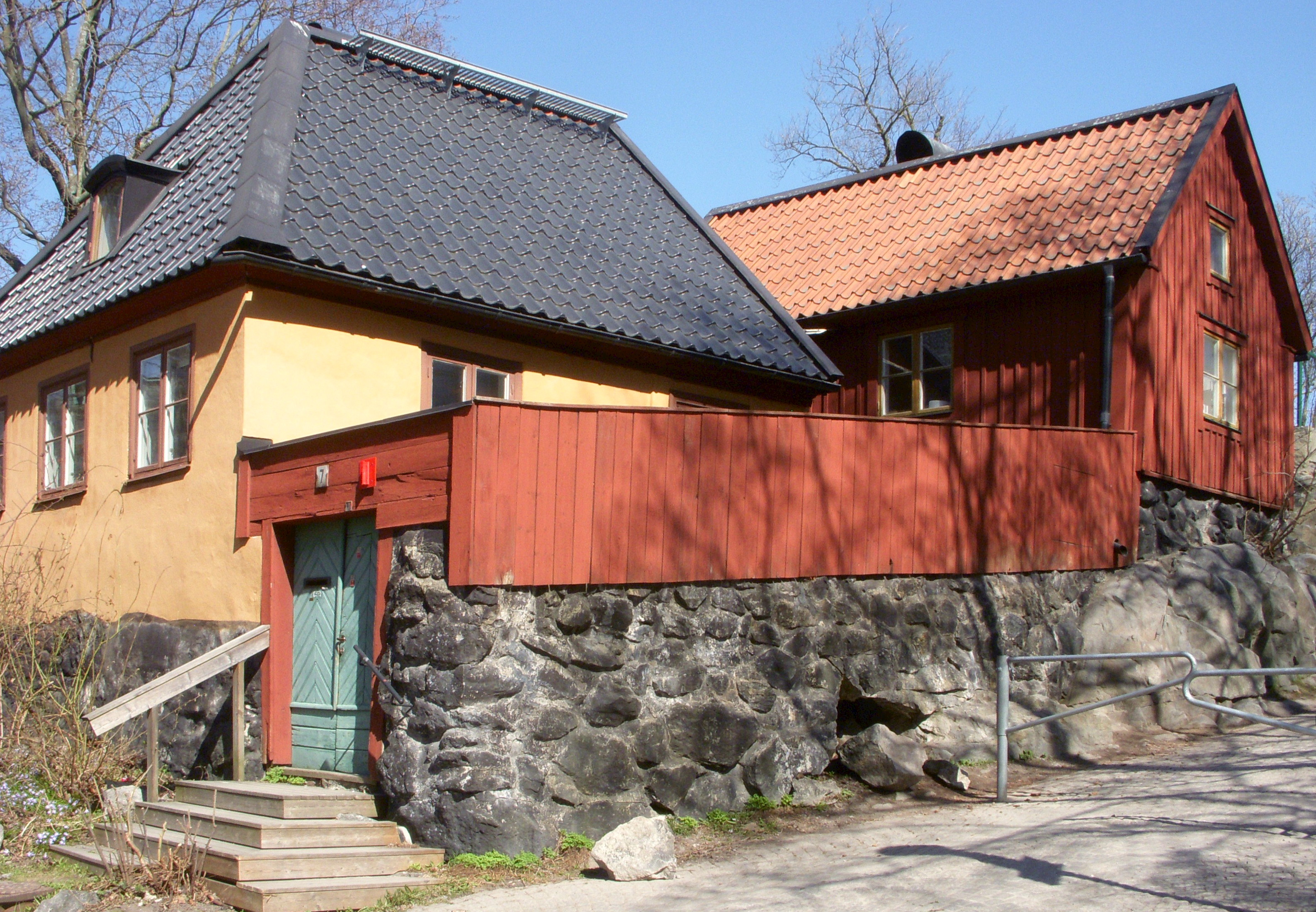 Sandbacksgatan 7